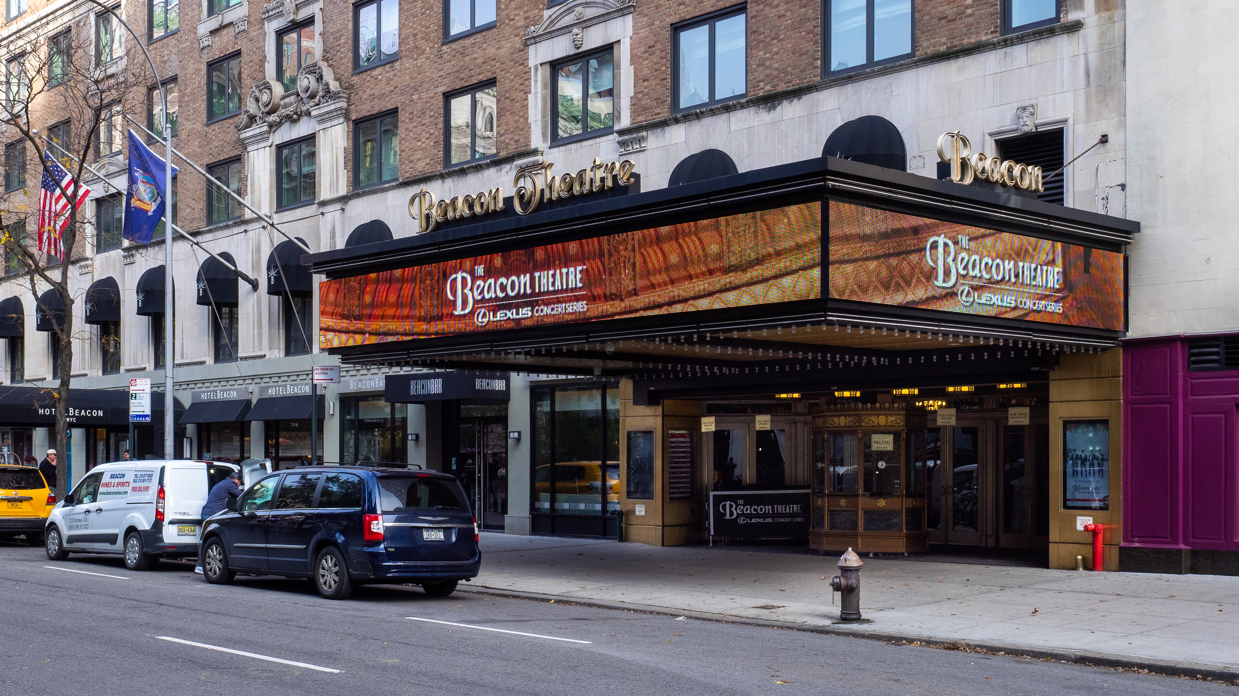 Upper West Side